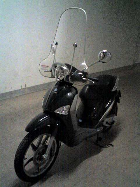 Piaggio Liberty 50 4tempi nero anno 2006